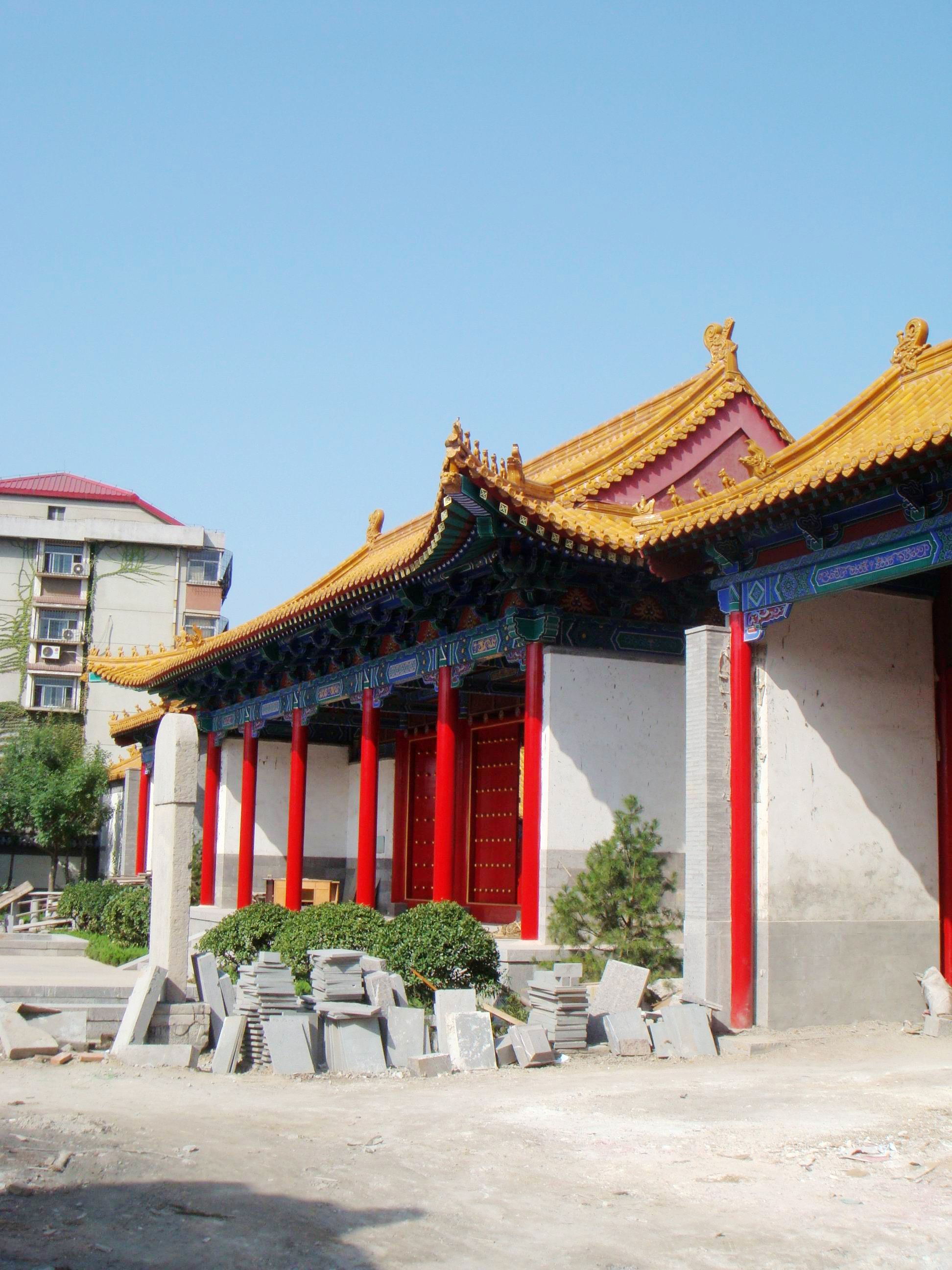 济南府学文庙，通过此门即进入大成殿所在的院落。